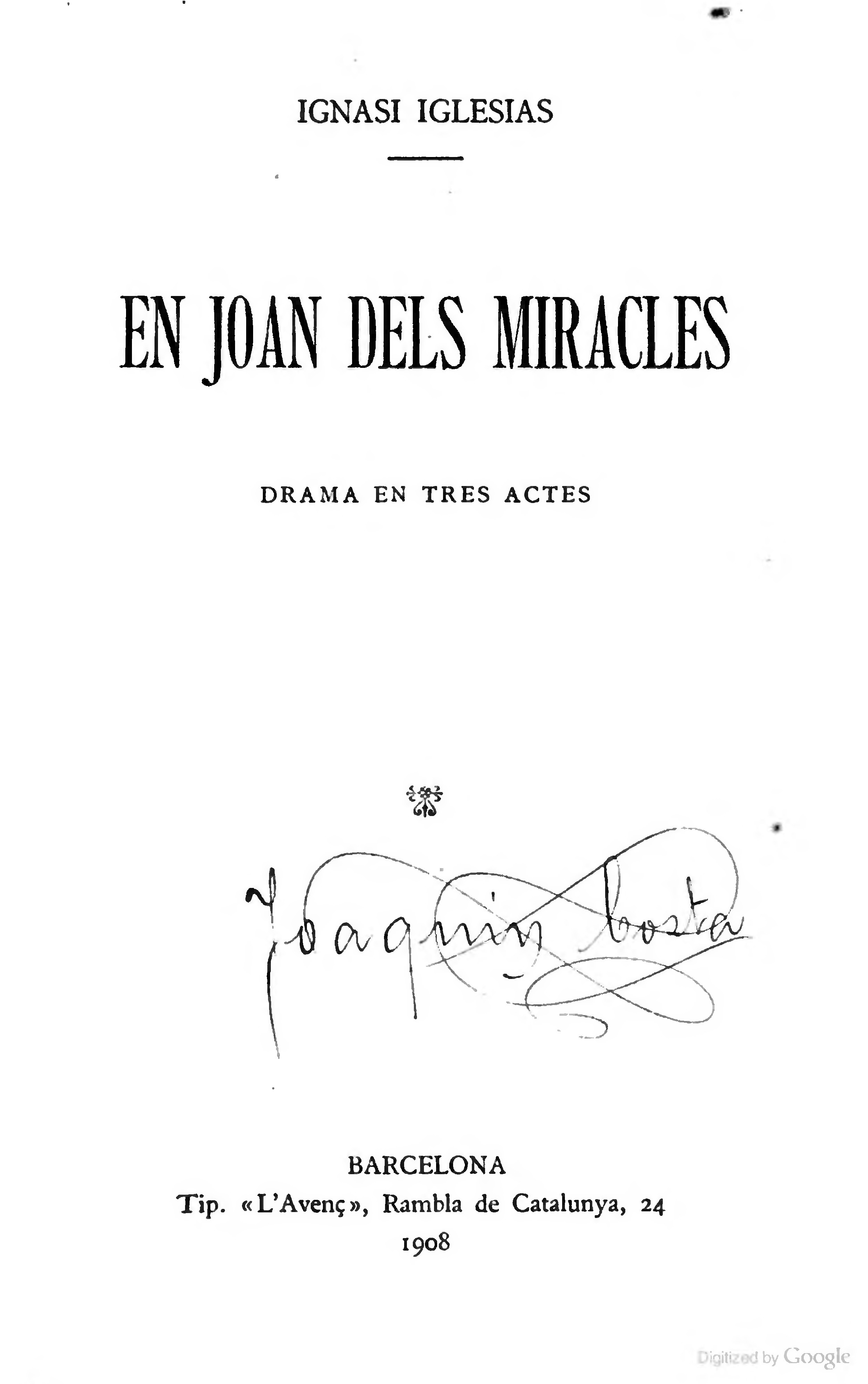 Binder's title